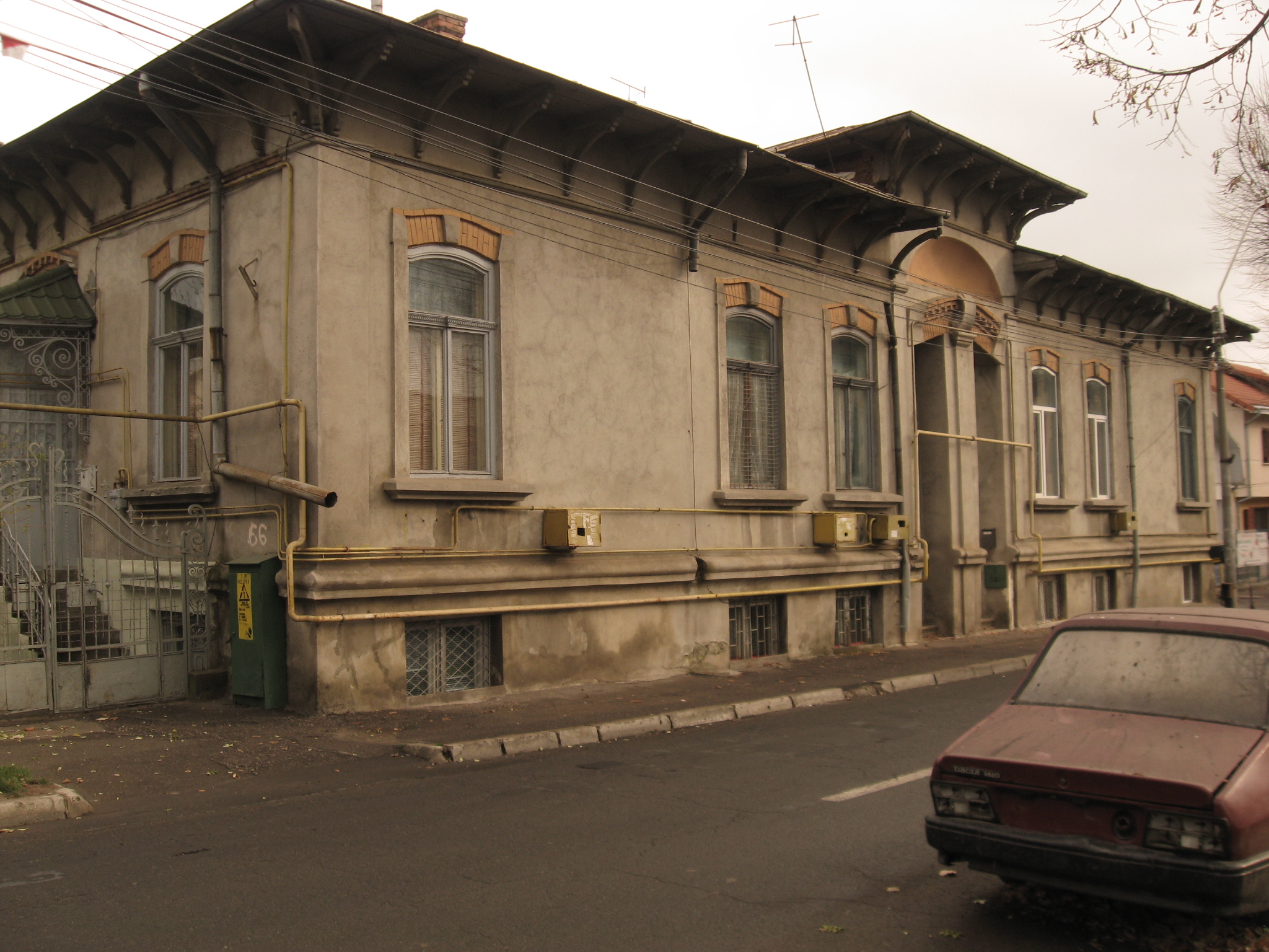 Fosta Școală